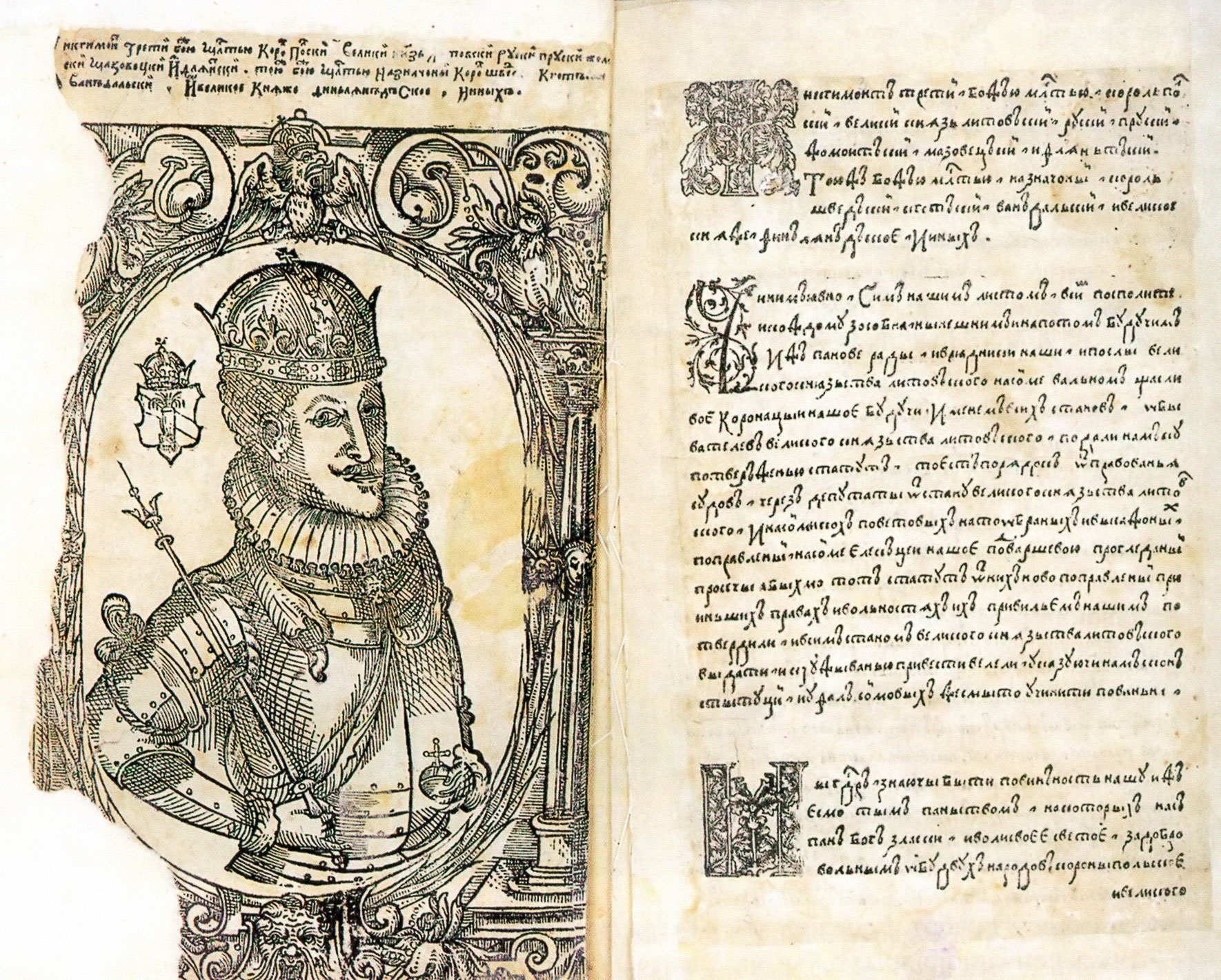 Беларуская (тарашкевіца): Статут Вялікага Княства Літоўскага (Statut Vialikaha Kniastva Litoŭskaha), партрэт Жыгімонта Вазы (Žygimont Vaza)